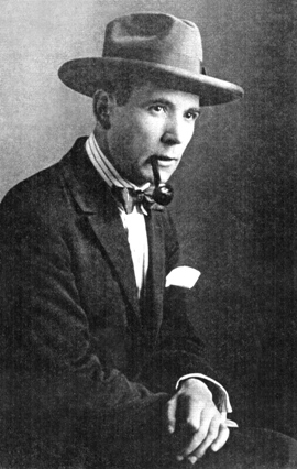 Fotógrafo español que desarrolló una sobresaliente labor en Puerto Montt entre los años 1911 y 1930.